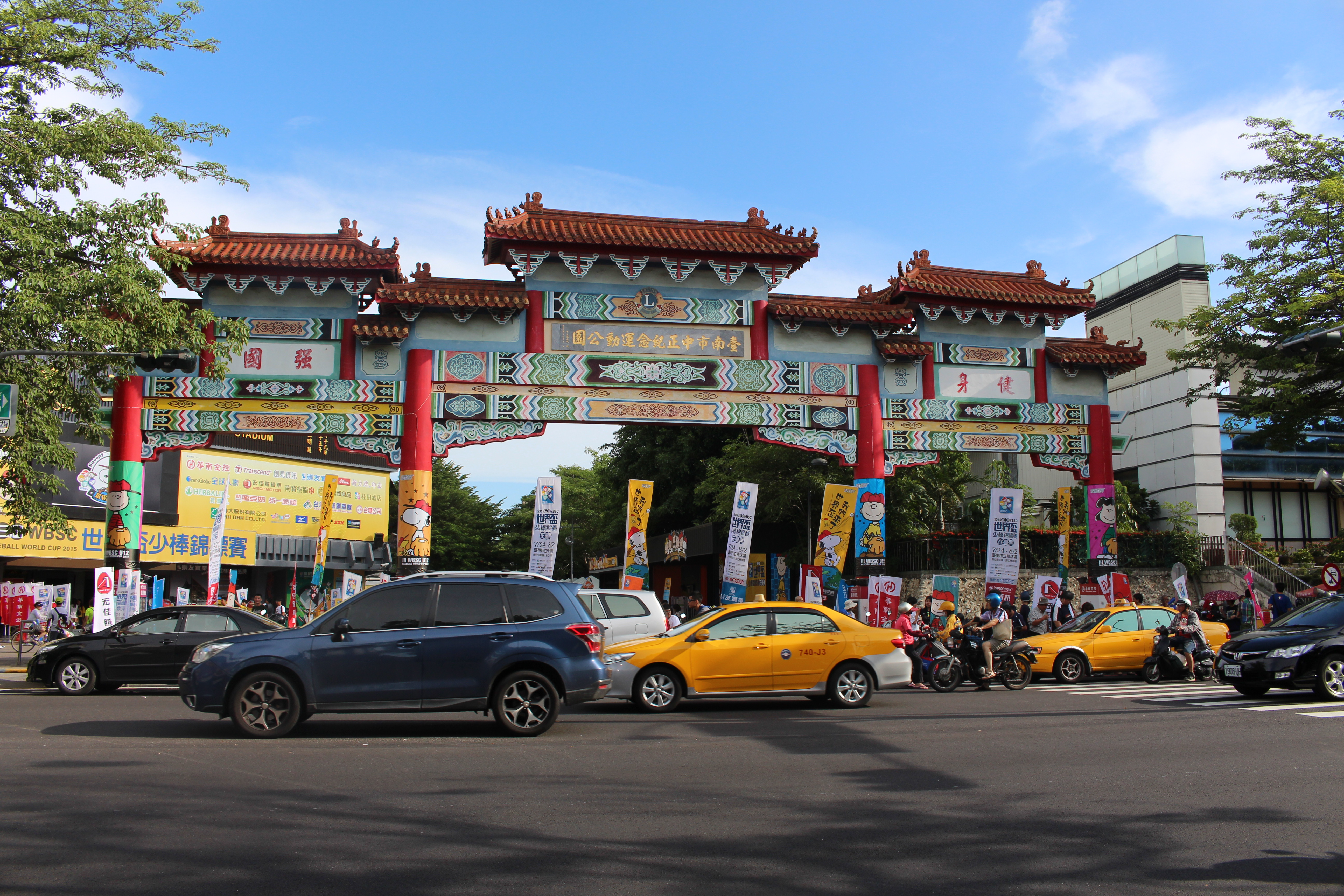 臺南市中正紀念運動公園，位於臺灣臺南市南區健康路以南、南門路與大同路之間。臺南市立棒球場在左方。拍攝時正值2015年第三屆12U世界盃棒球賽在臺南市立棒球場開賽。